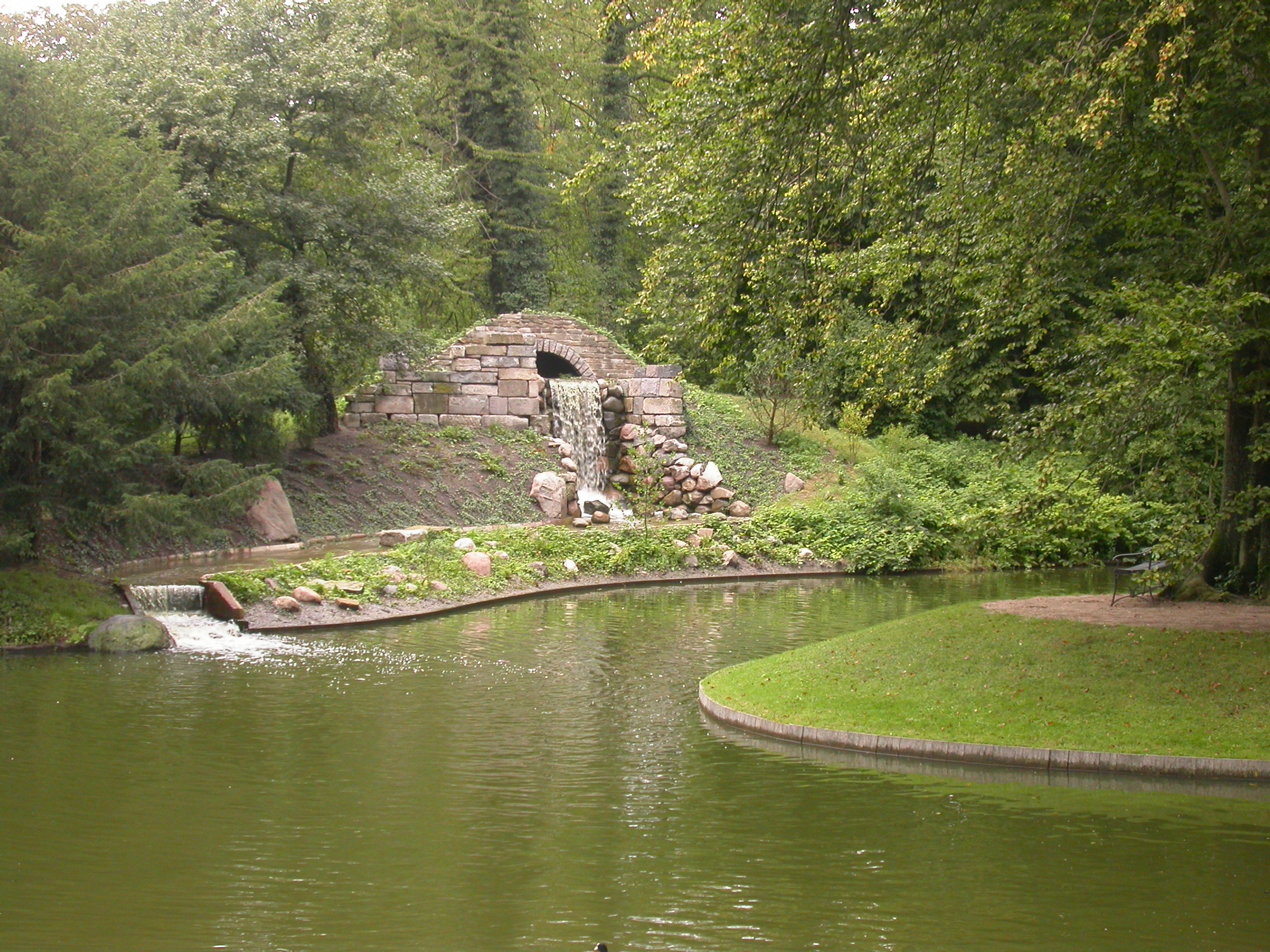 The waterfall in Frederiksberg Gardens in Copenhagen, Denmark